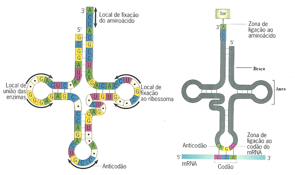 RNA de transferencia